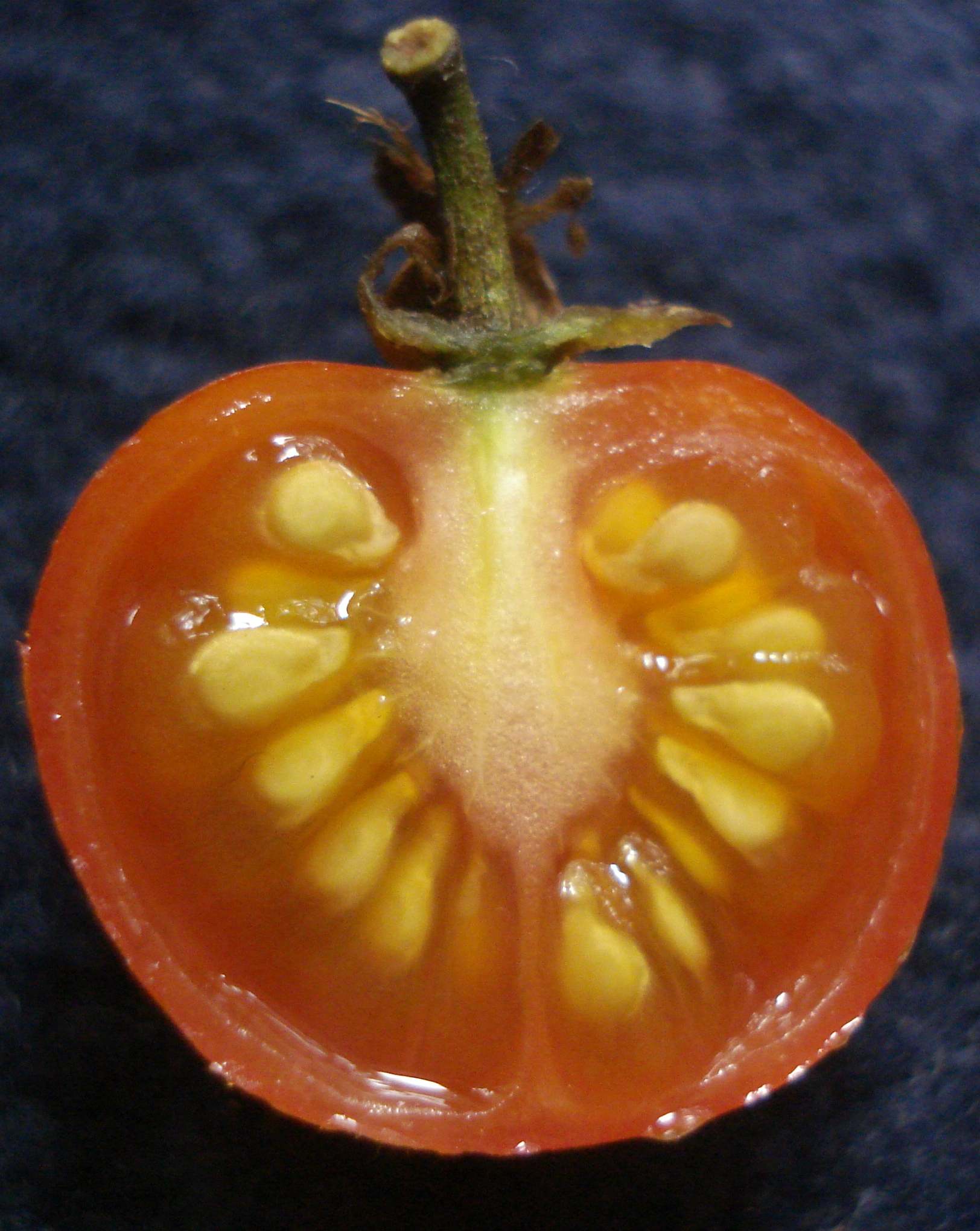 കുട്ടിത്തക്കാളി - മുറിക്കുമ്പോഴുള്ള കാഴ്ച്ച.